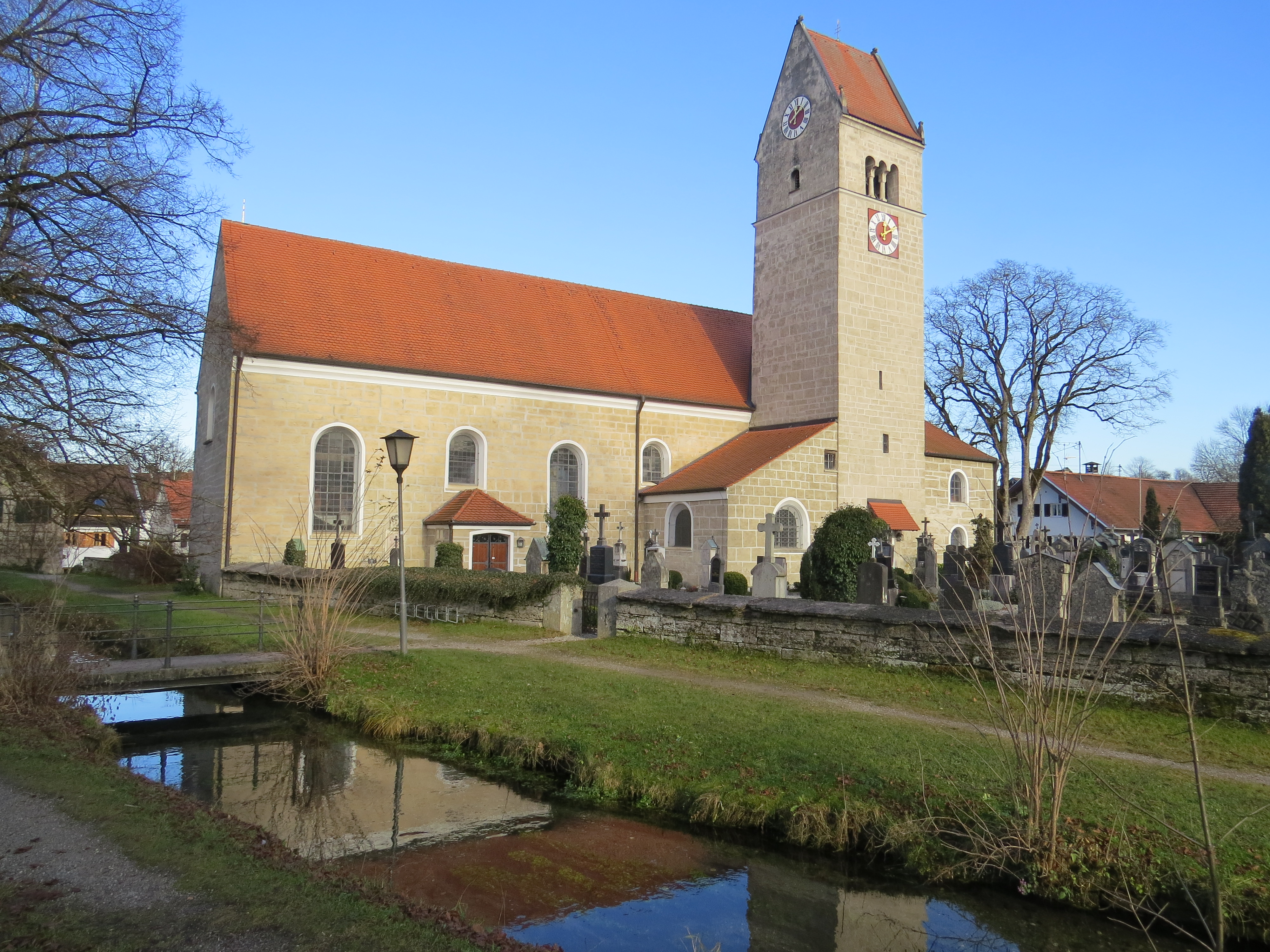 Pfarrkirche in Huglfing